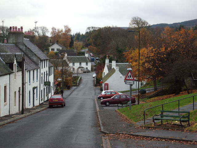 Gargunnock Village